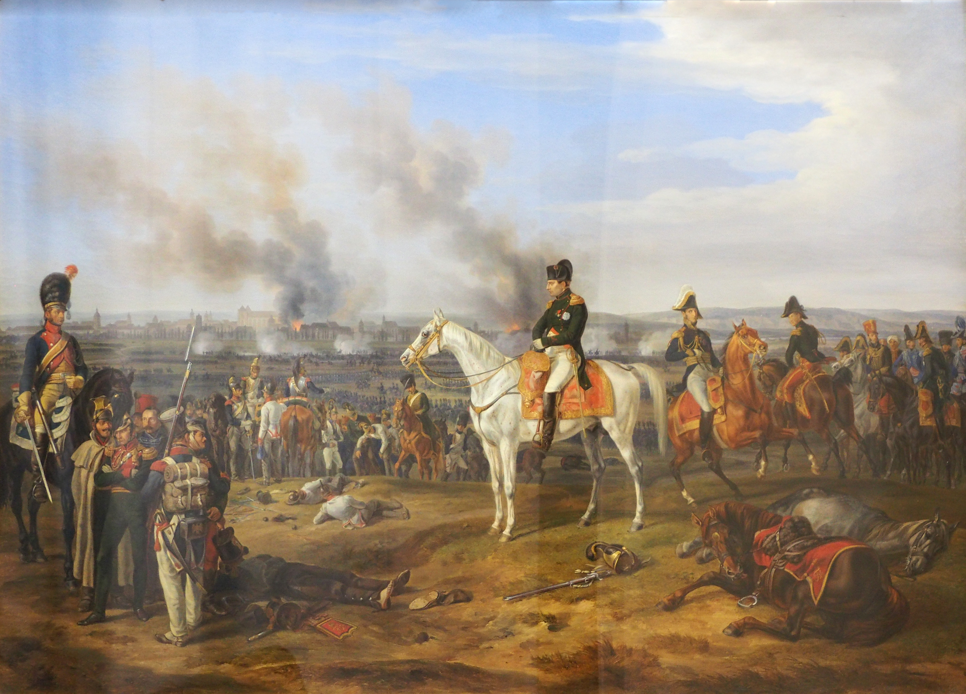 Napoleon I. 1809 vor Regensburgtitle QS:P1476,de:"Napoleon I. 1809 vor Regensburg" label QS:Lde,"Napoleon I. 1809 vor Regensburg"